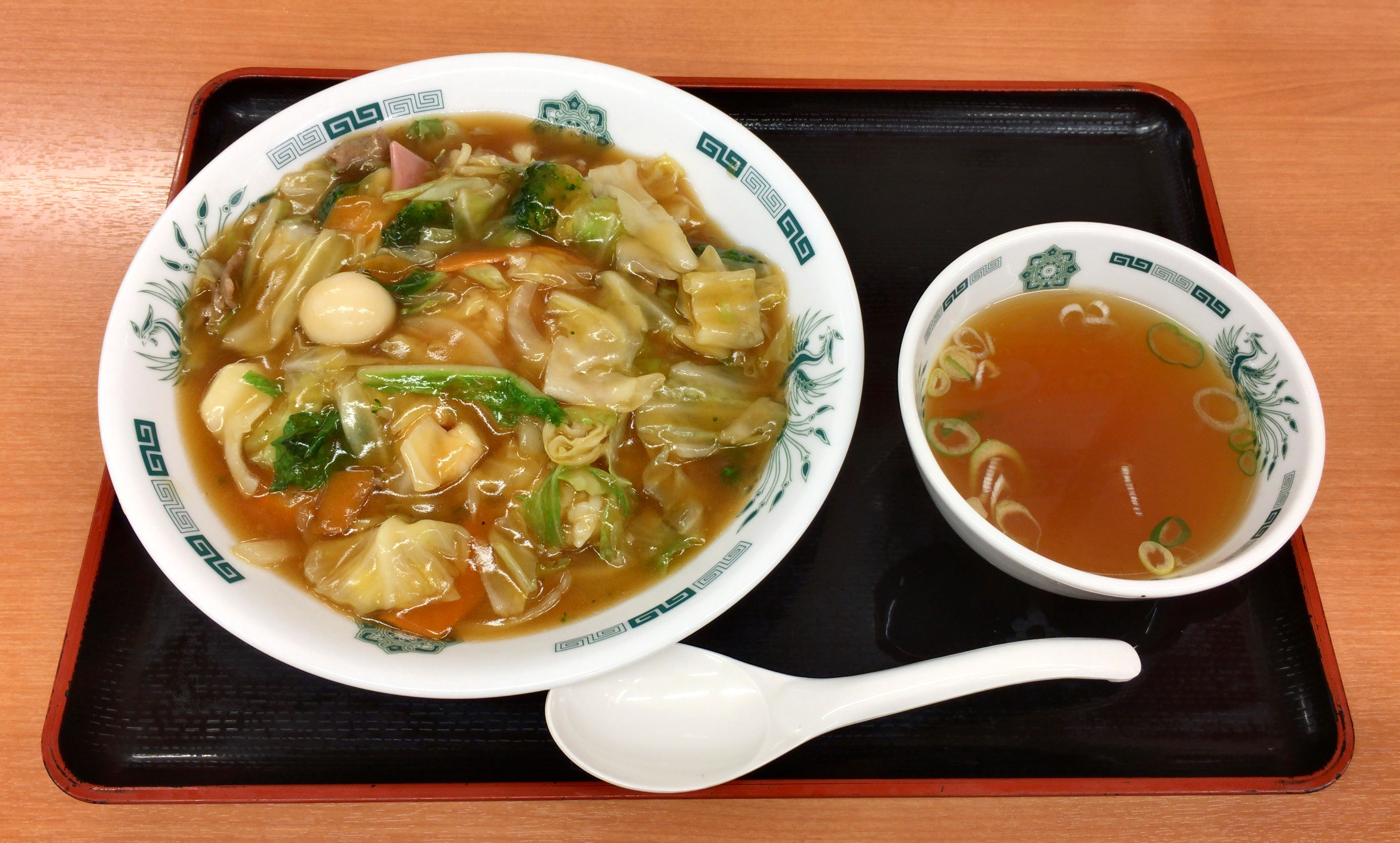 日高屋 中華丼（610円）